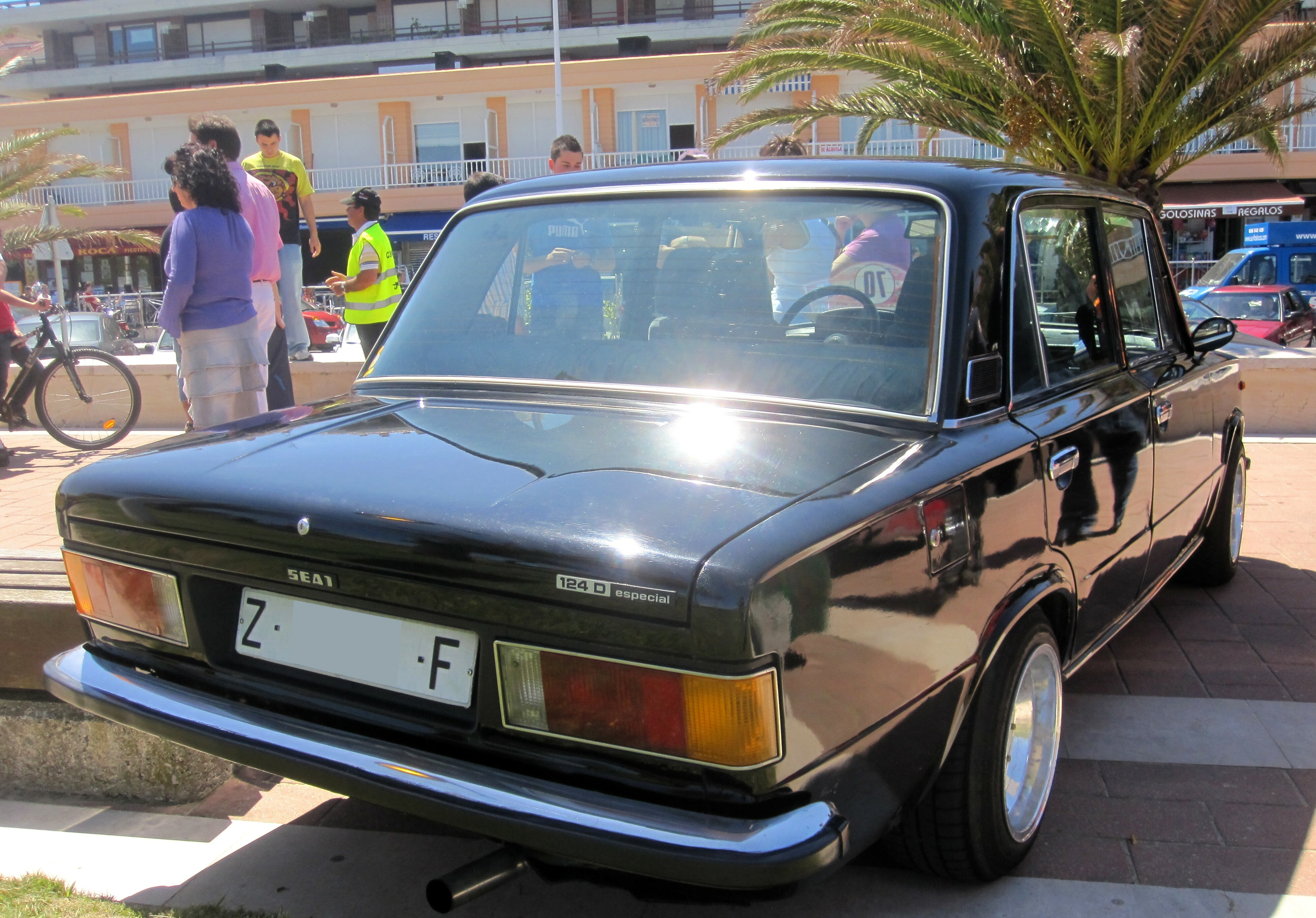 / 1976 plates from Zaragoza (Aragón but seen in Suances (Cantabria).